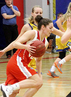 Úrvalsdeild kvenna game between Snæfell and Grindavík on October 29, 2014.